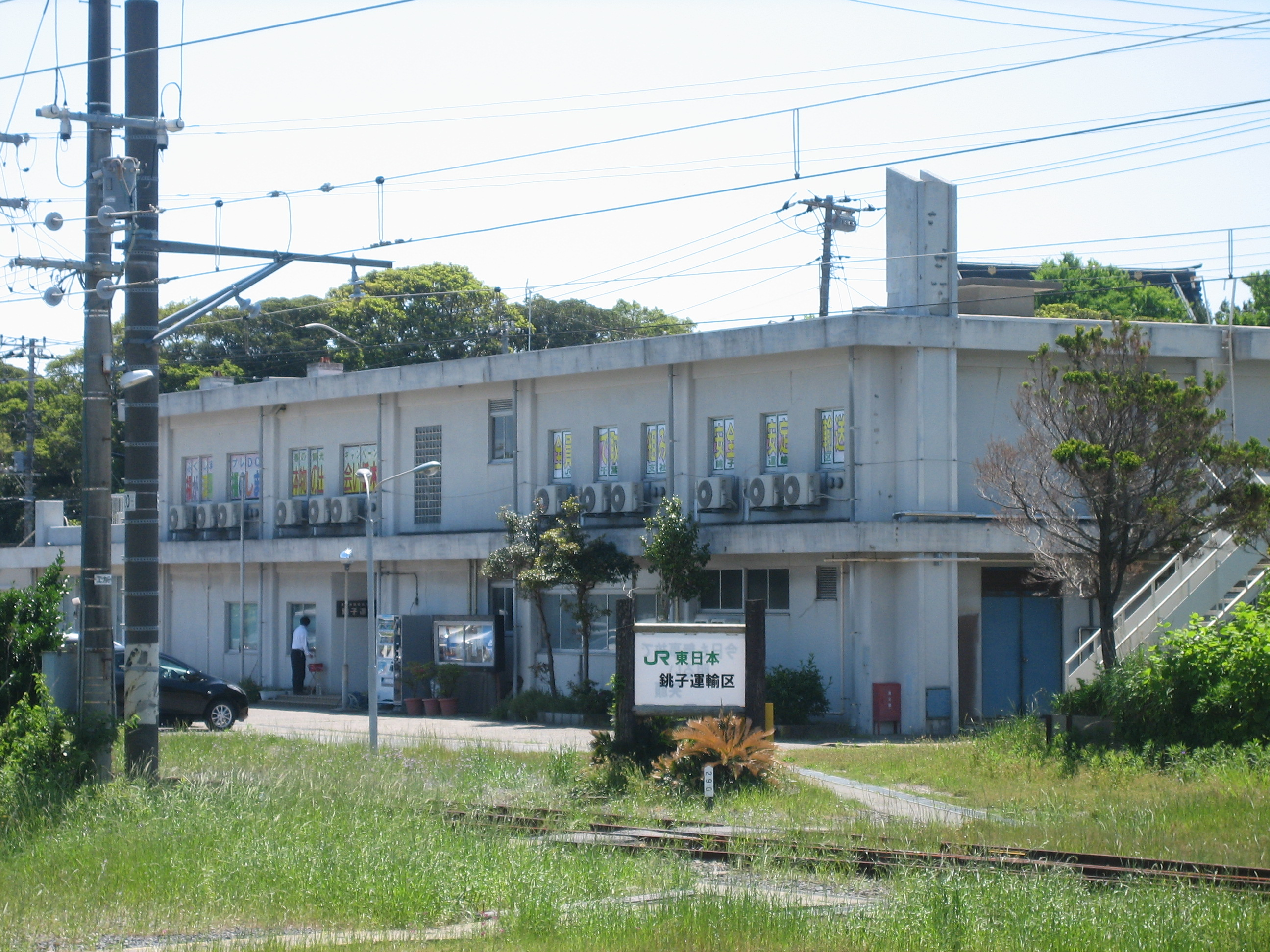 JR東日本千葉支社銚子運輸区